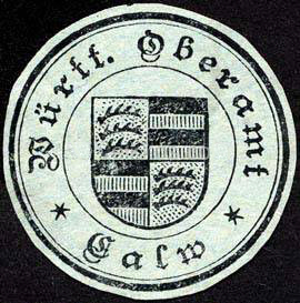 Oberamt Calw, Briefsiegel (letter seal stamp)